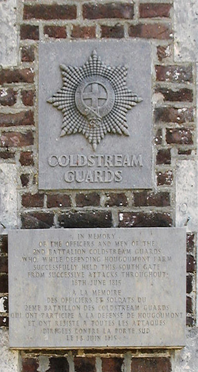 Photo personnelle de Licensing Description Plaques commémoratives des Coldstream Guards à Hougoumont DateMay 2008SourceOwn work by the original uploaderAuthorfr:Utilisateur:MicharlemagnePermission(Reusing this file) Publié sous licence Plaques commémoratives des Coldstream Guards à Hougoumont